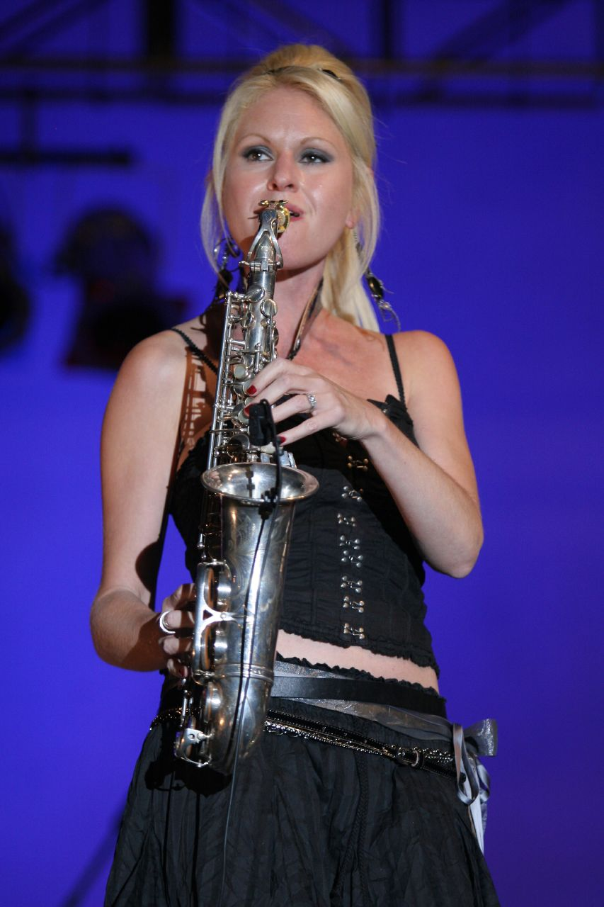 095-HiRes-Abair@RJF06095-HiRes-Abair@RJF06